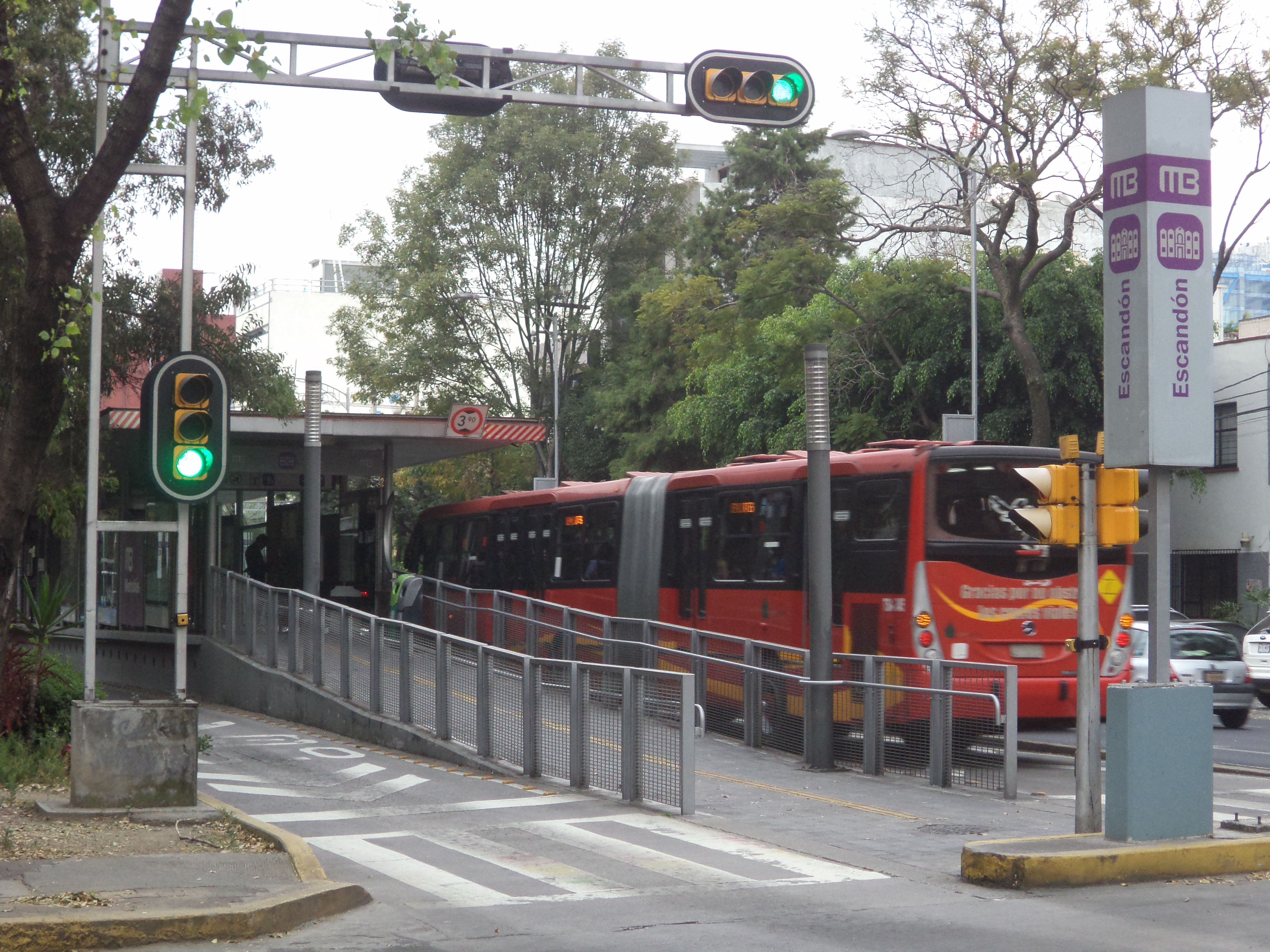 Estación Escandón